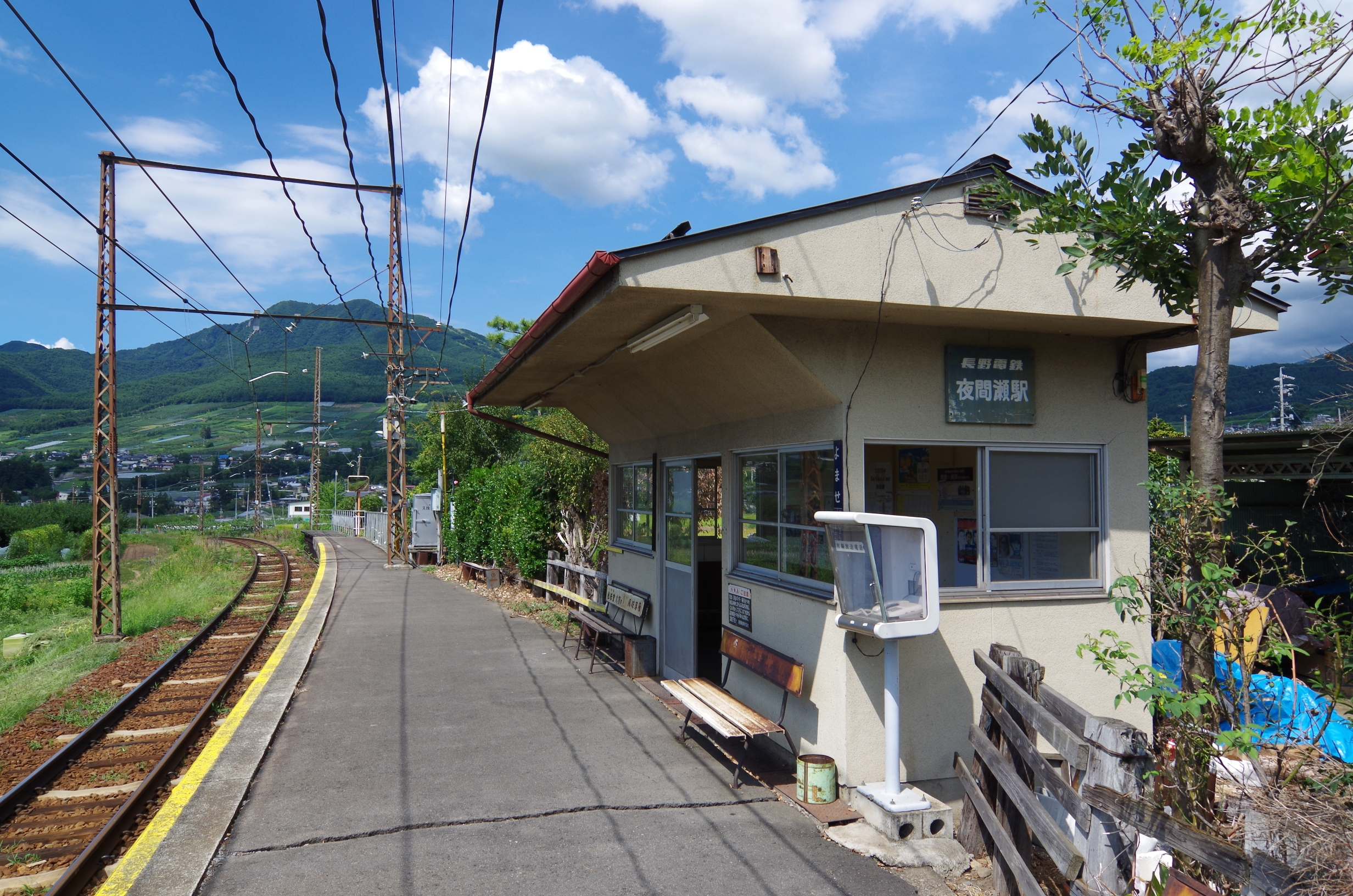 夜間瀬駅ホーム